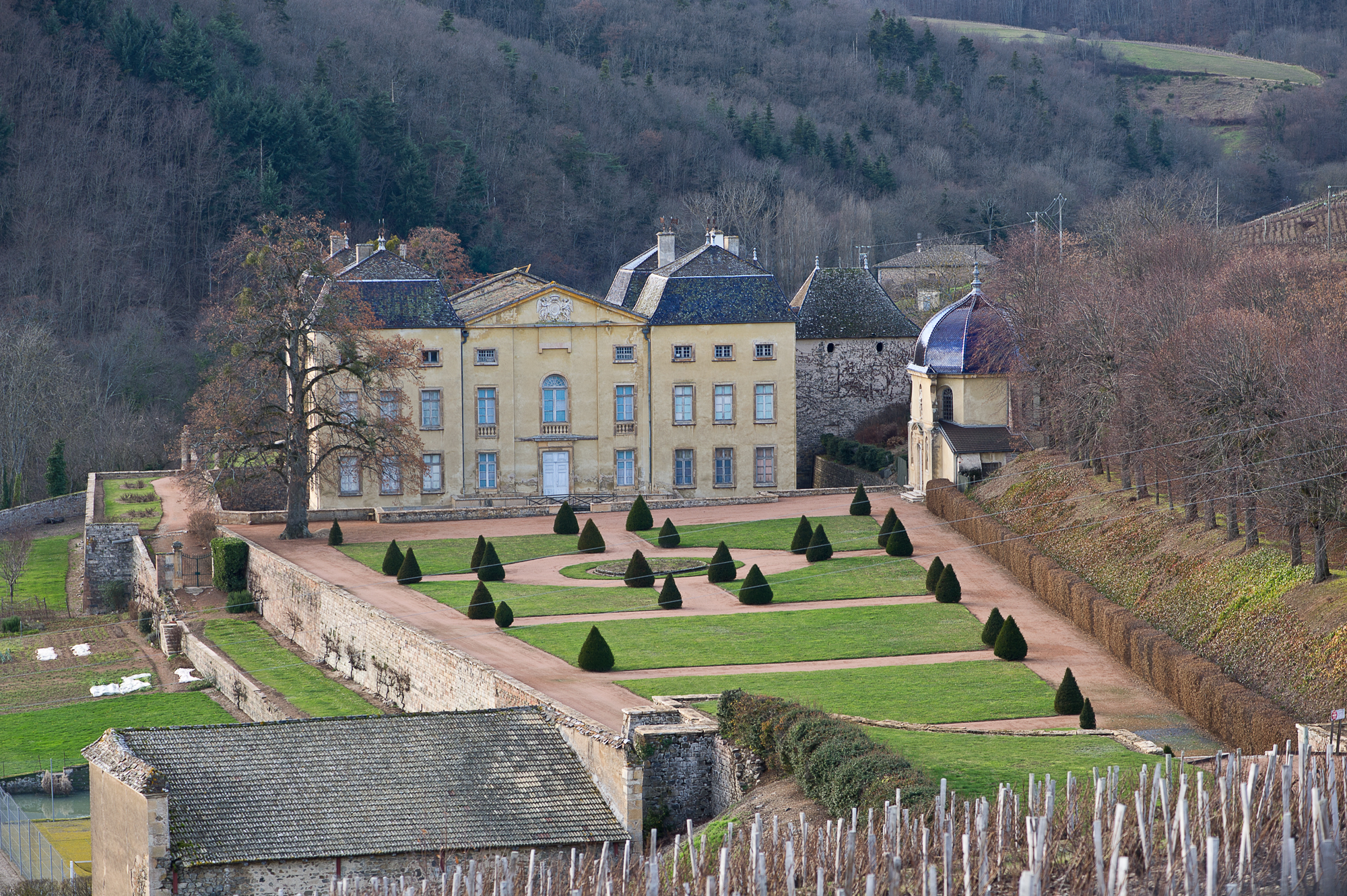 Château de La Roche, (Inscrit, 1947) .